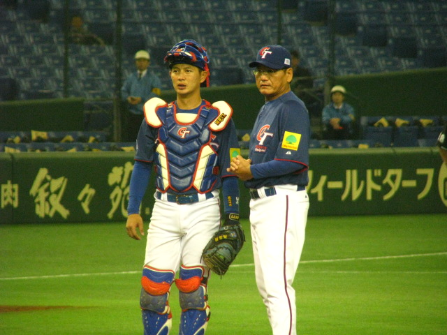 謝長亨與高志綱。